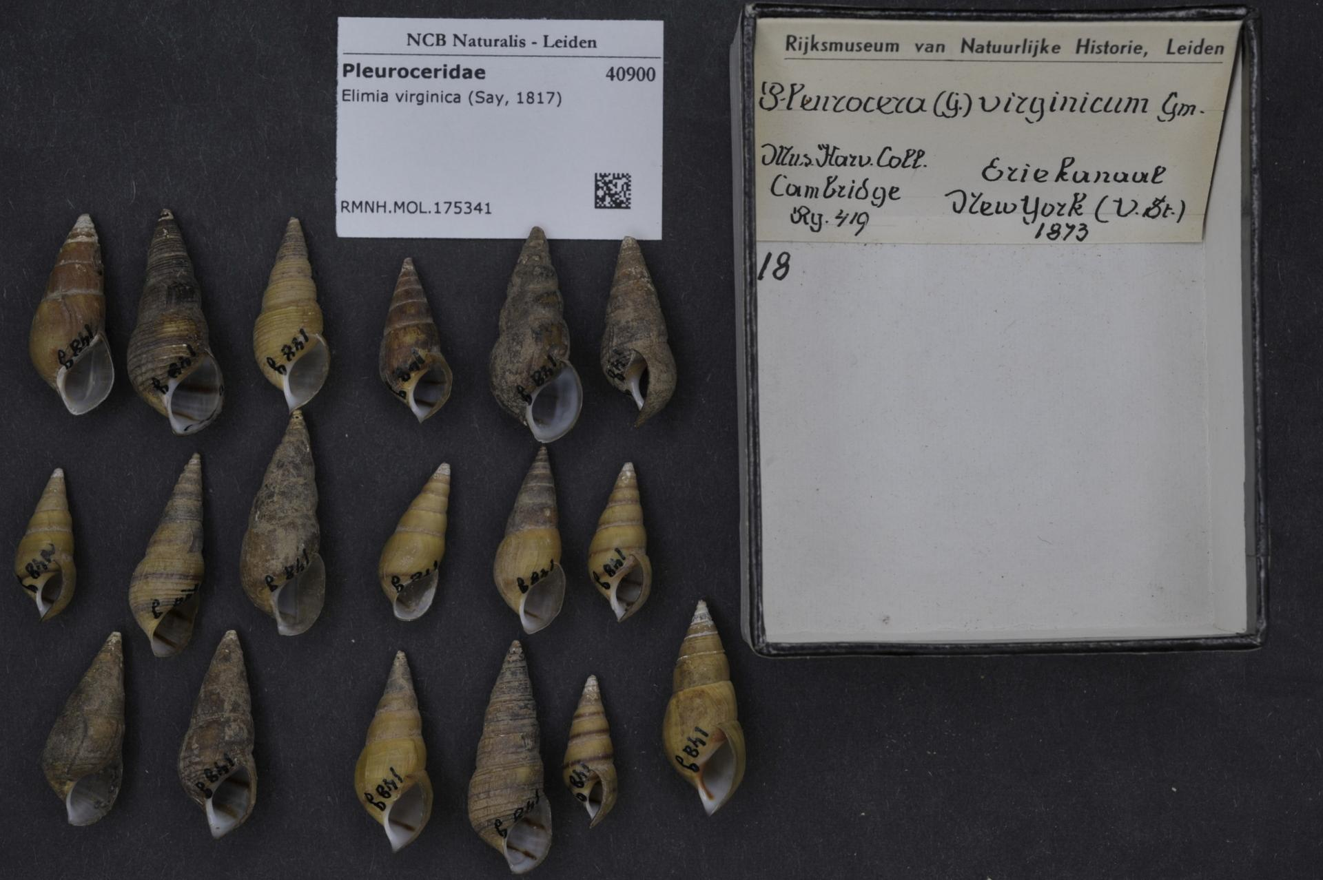 Elimia virginica (Say, 1817)